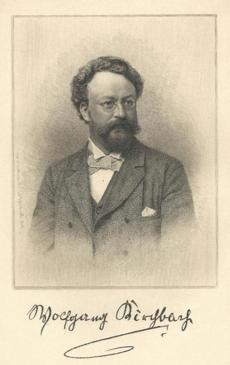 Porträt Wolfgang Kirchbach. Radierung von Johann Lindner, 1895, mit faksimilierter Unterschrift des Porträtierten